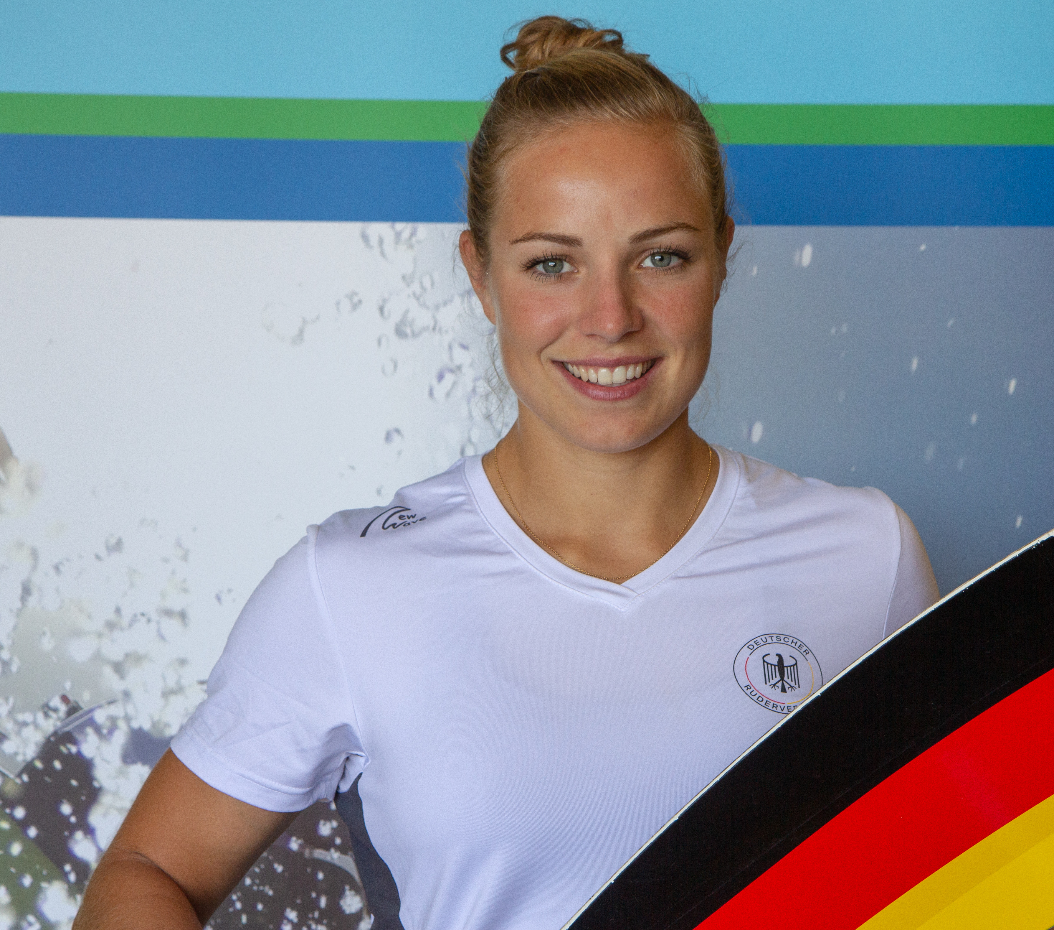 Michaela Staehlberg beim Medientag des Deutschen Ruderverbandes in der Ruderakademie Ratzeburg am 22. August 2018.